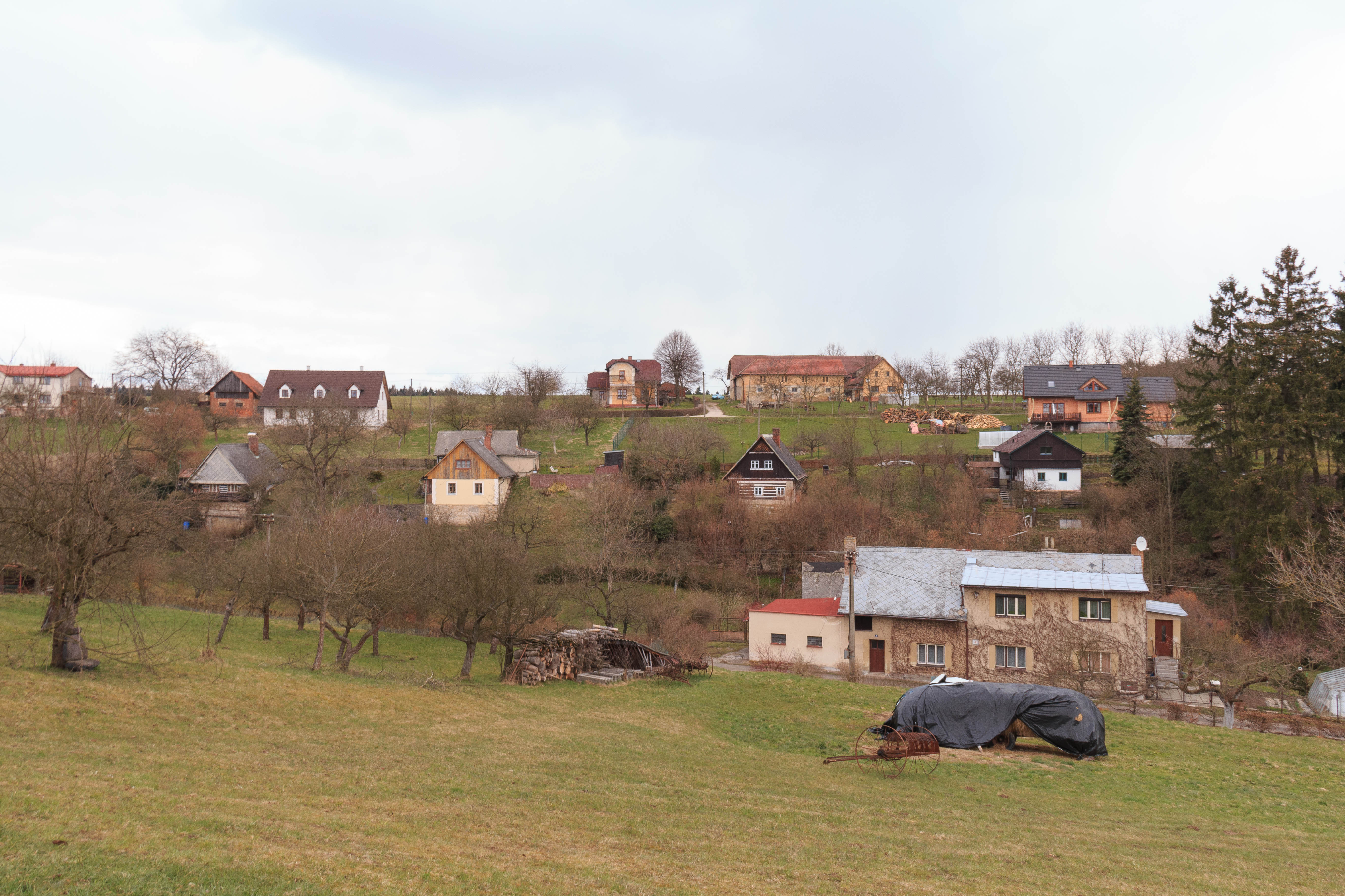 Světlá pohled ze silnice